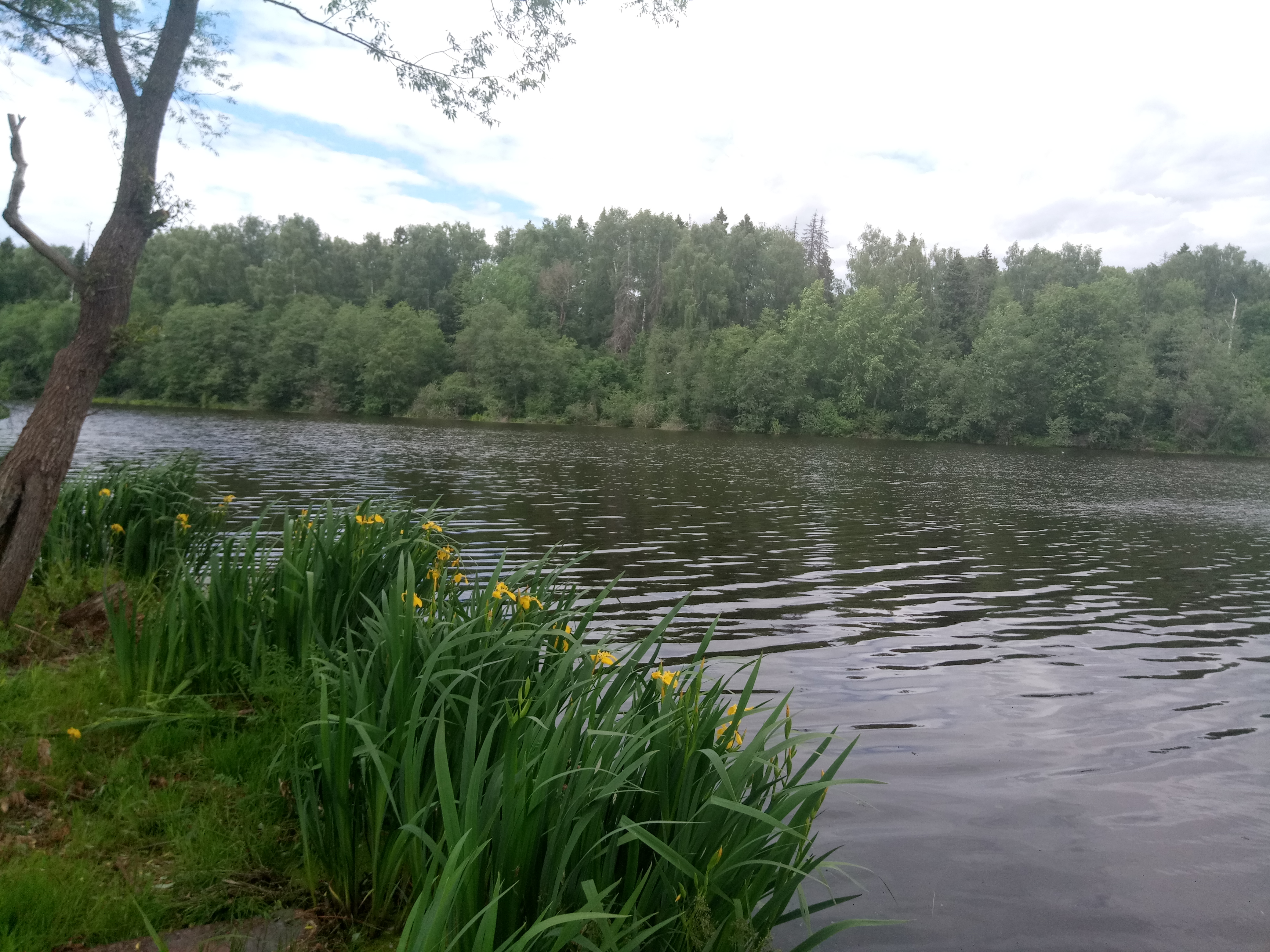 на окраине села Богослово